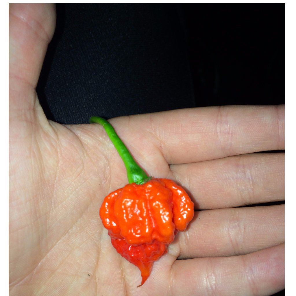 Carolina Reaper, chilifrugt